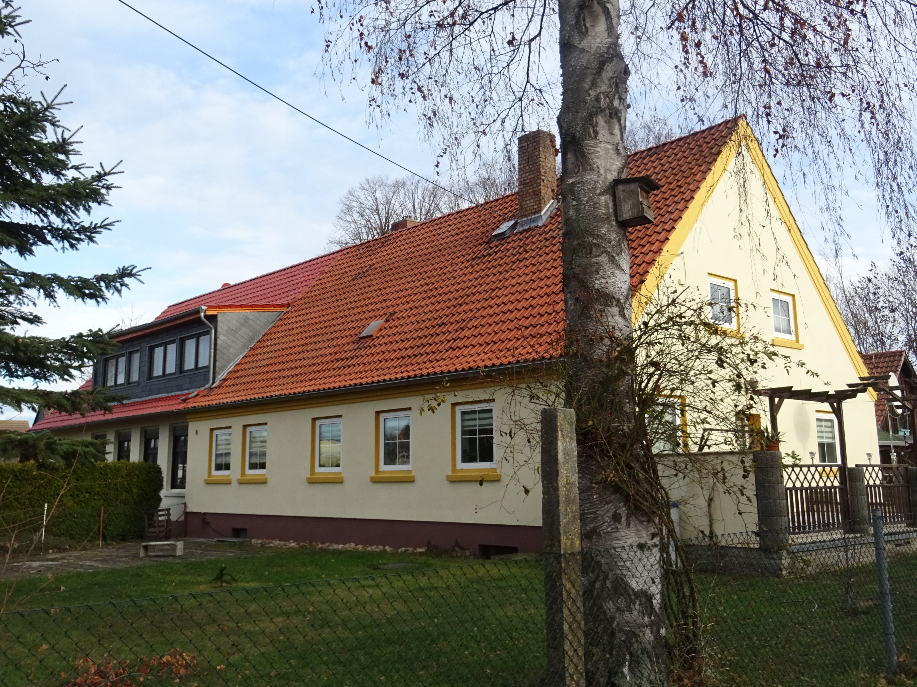 Blumenberg, Stadt Wanzleben, denkmalgeschützte ehem. Schule, Schulstraße